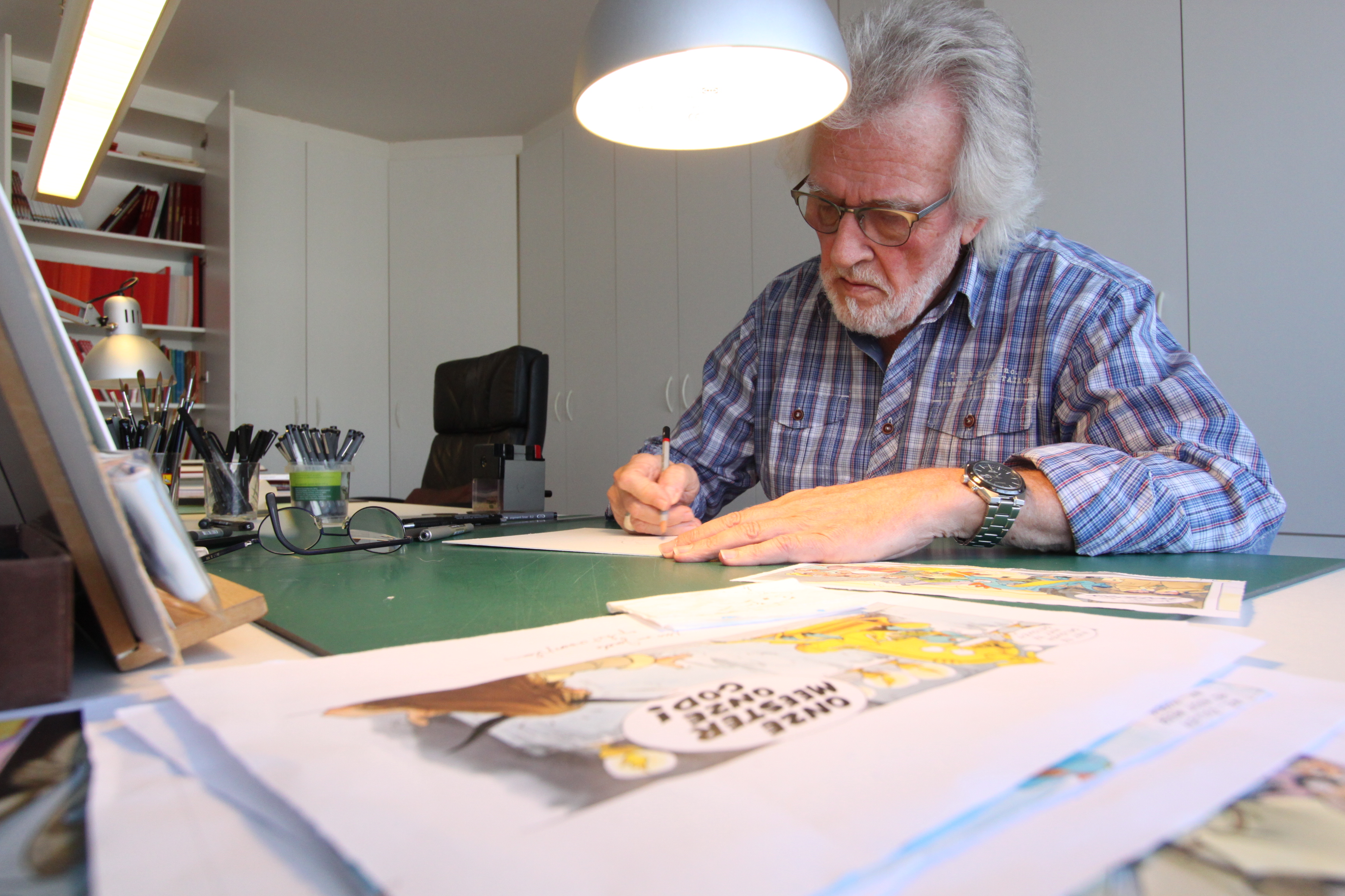 Paul Geerts in zijn tekenkamer op 5 maart 2019 tijdens de opnames van een aflevering van De Perfecte Podcast over Suske en Wiske.